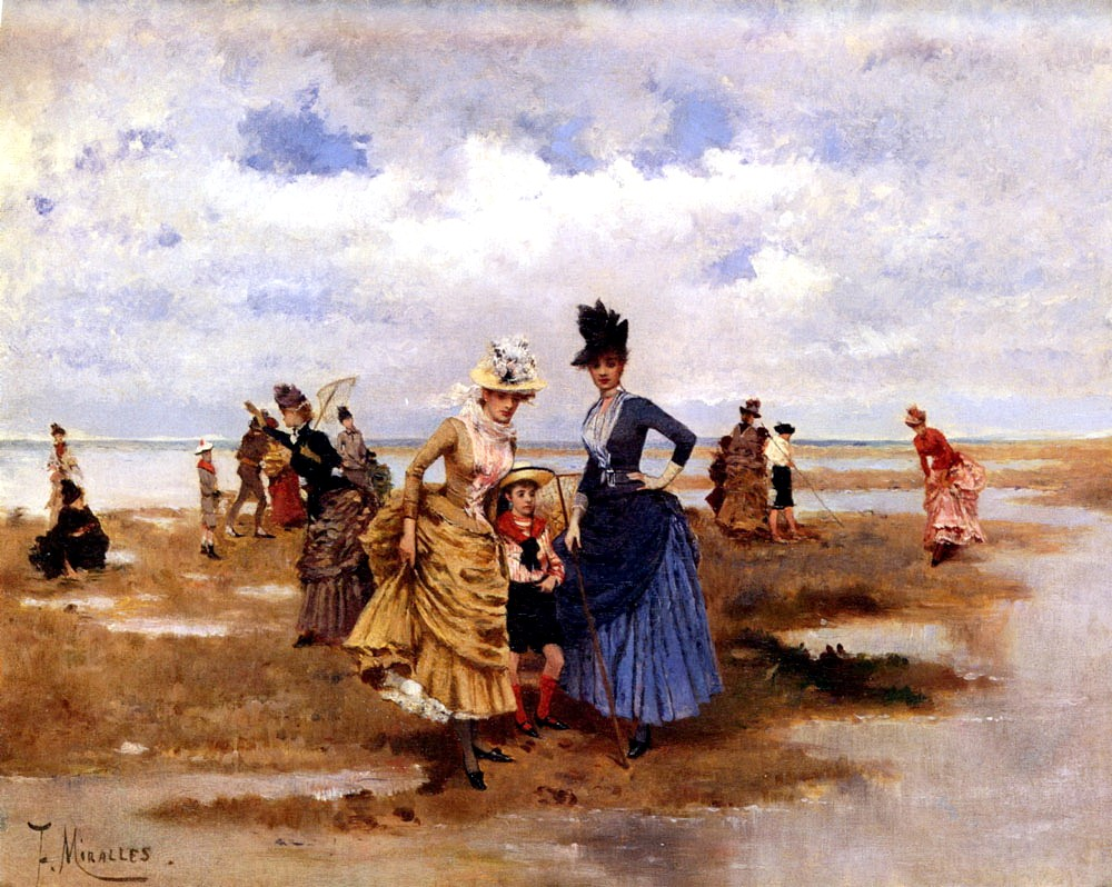 A la plage, huile sur toile de Francesco Miralles Galup.